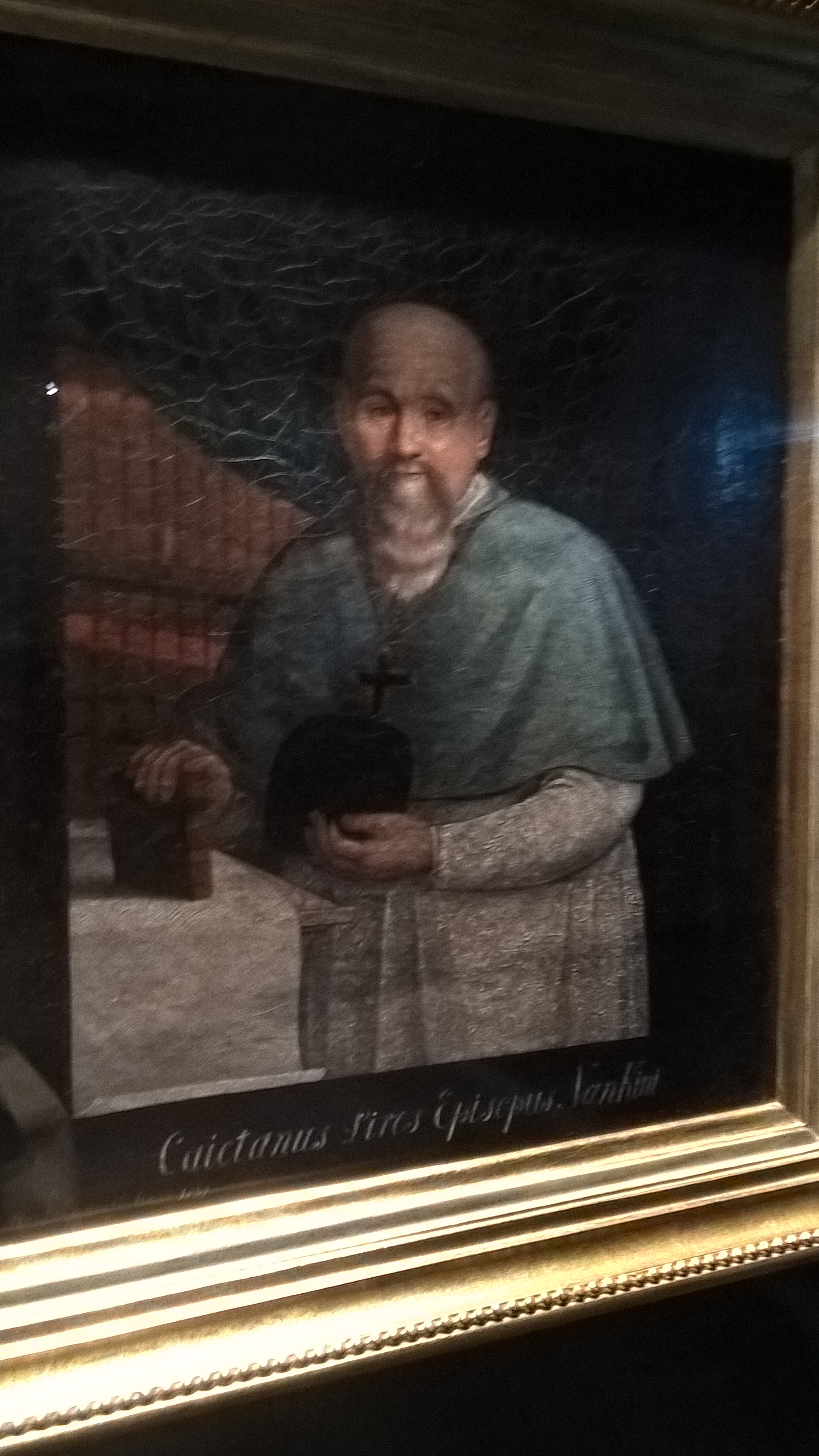 "Retrato de Caetano Pereira Pires" óleo sobre tela de de Autor desconhecido, de cerca de 1838, na Fundação Oriente.